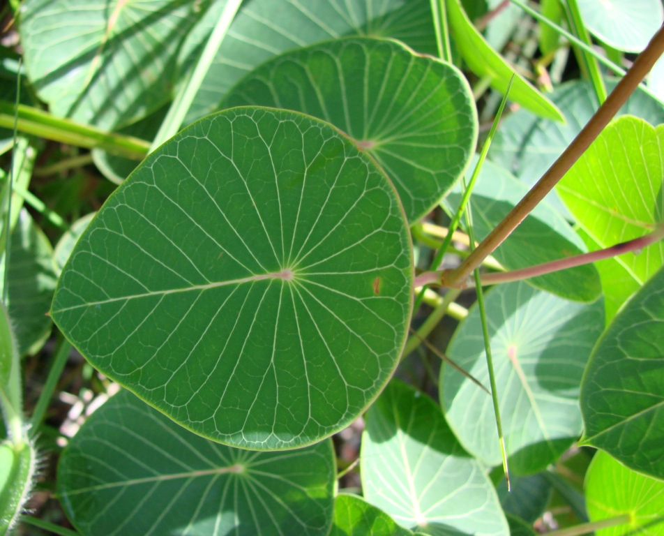 Stipecoma peltigera - APOCYNACEAE Parque Nacional da Chapada dos Veadeiros - Cavalcante - Goiás - Brasil.